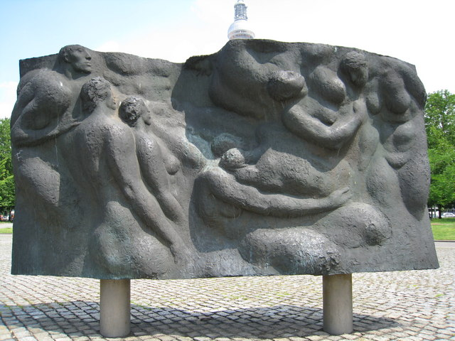 Skulptur, Berlin